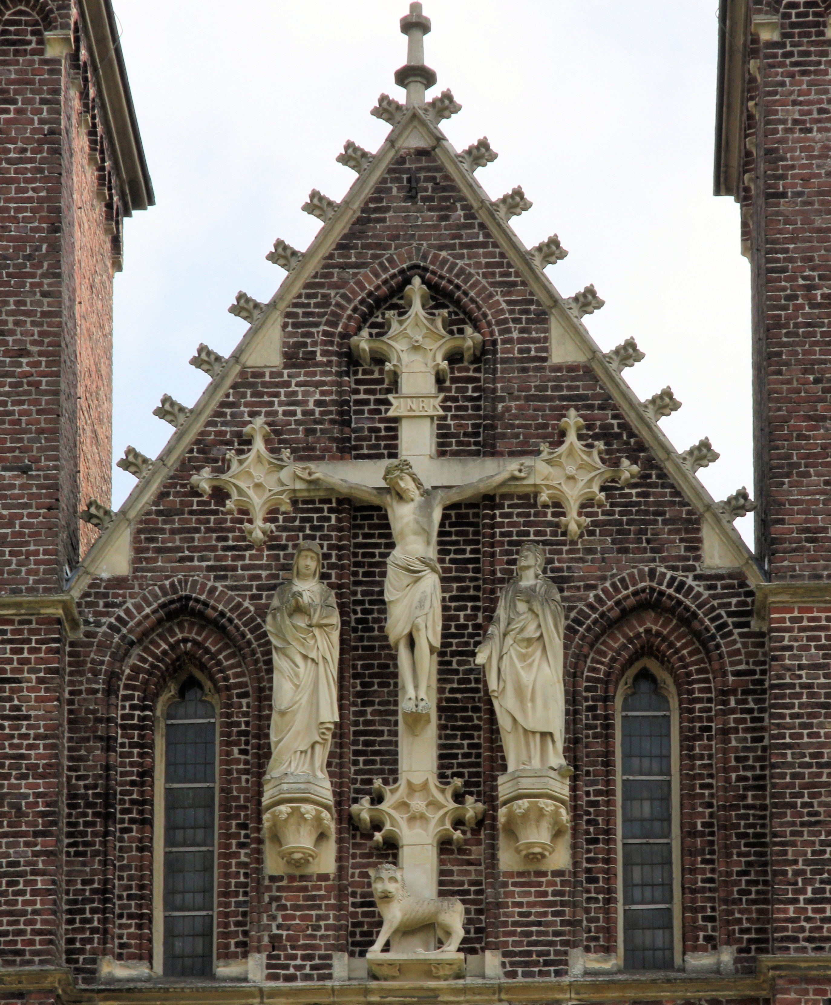 Detailansicht der Kirche St. Maria Immaculata in Rhedebrügge, Borken, NRW